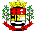 Brasão_Carbonita_MG.gif